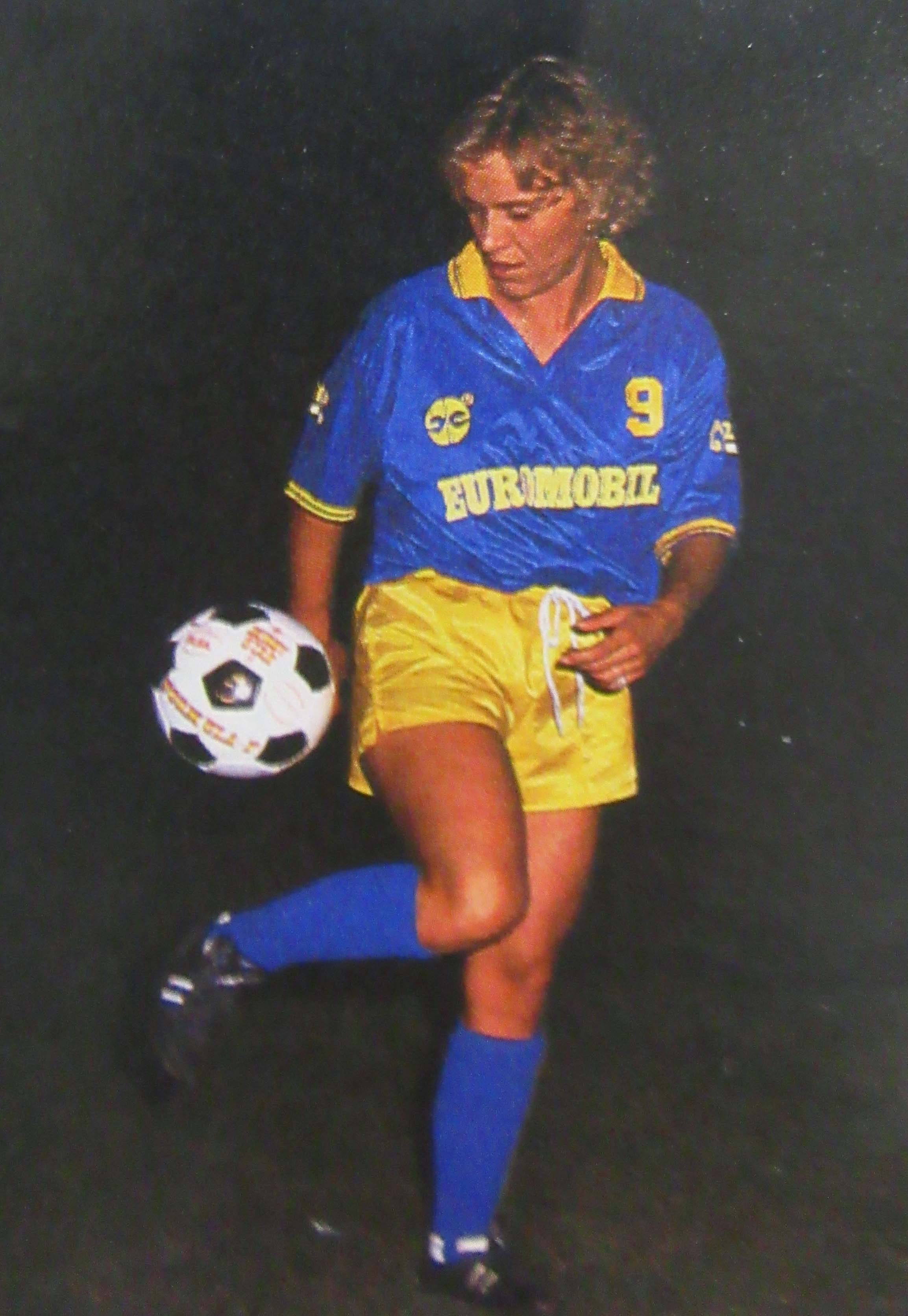 Foto di Susanne Augustesen dell'A.C.F. Modena Euromobil nel campionato di Serie A femminile 1989-1990.